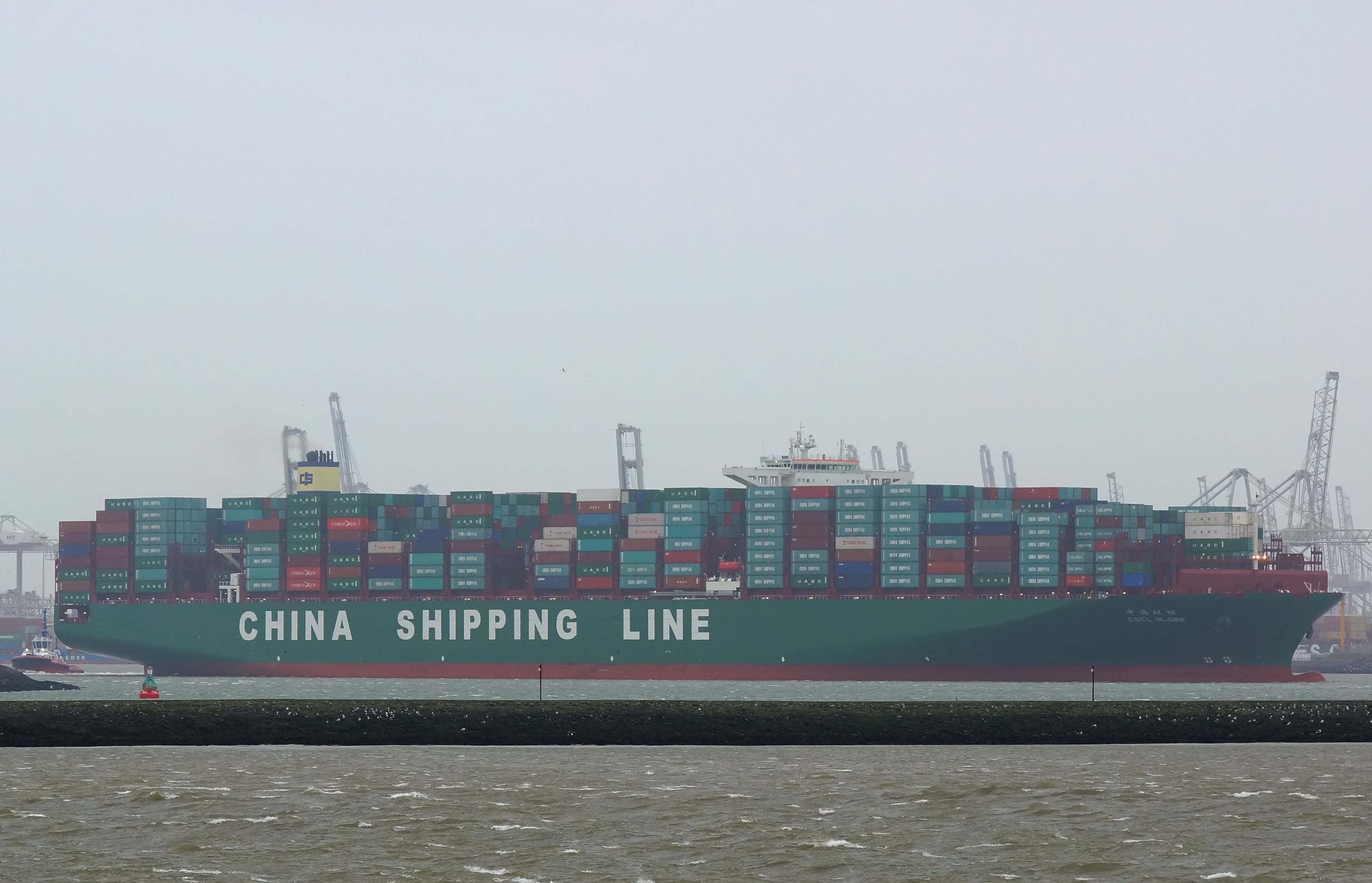 Beerkanaal/Calandkanaal 12-1-2015. CSCL GLOBE vertrok naar Hamburg.